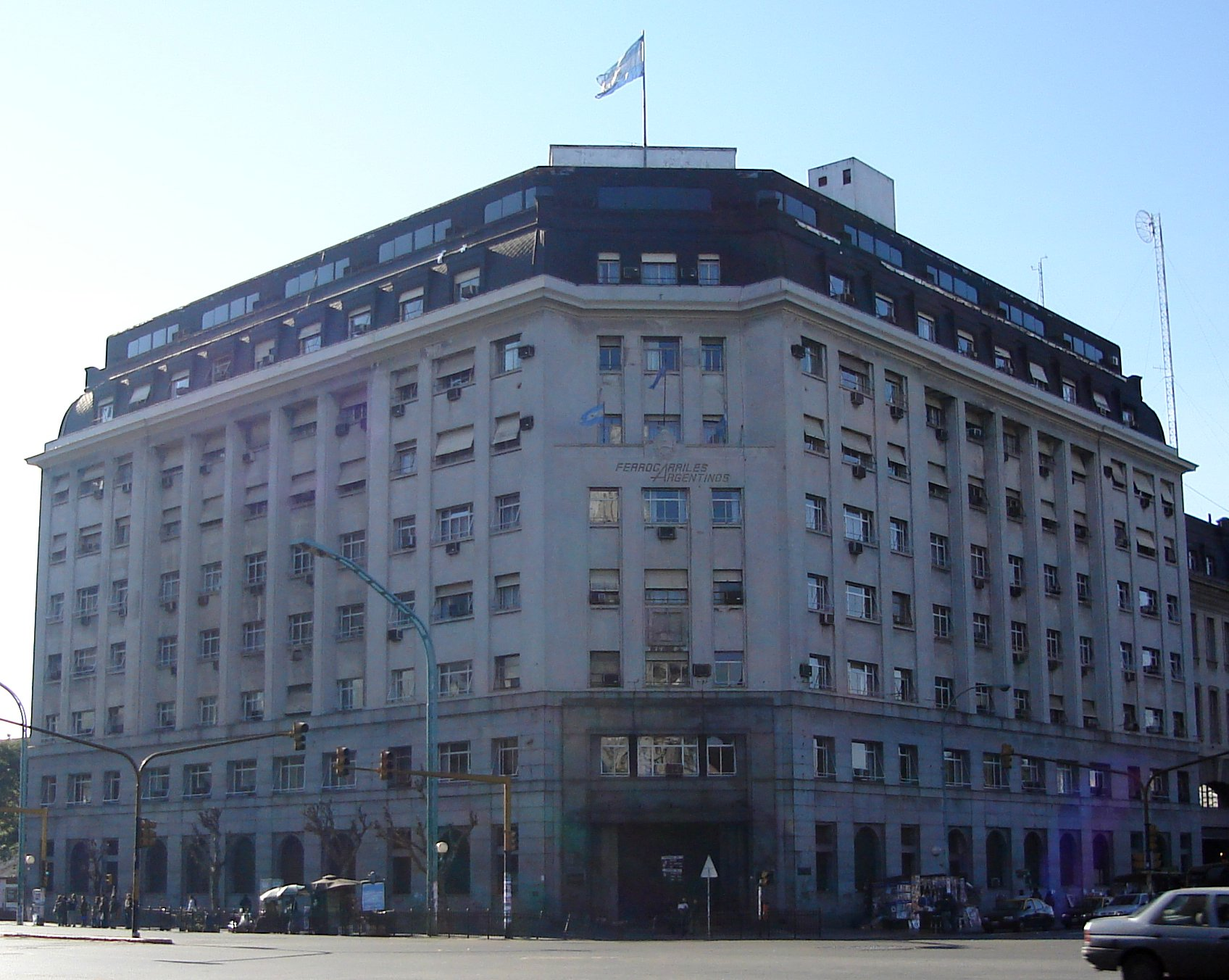 Sede central de la Administración de Infraestructuras Ferroviarias (ADIF) junto a la estación terminal de Retiro. Antiguo edificio de la ONABE, y antes de Ferrocarriles Argentinos. Buenos Aires, Argentina.